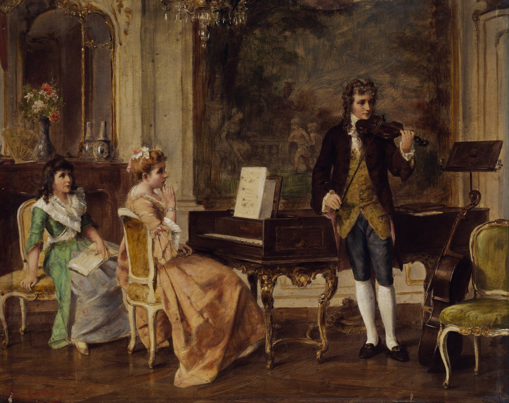 Eines von zwei Gemälden eines Gemäldepaars: Musik. Öl auf Holz. 20 x 25 cm.